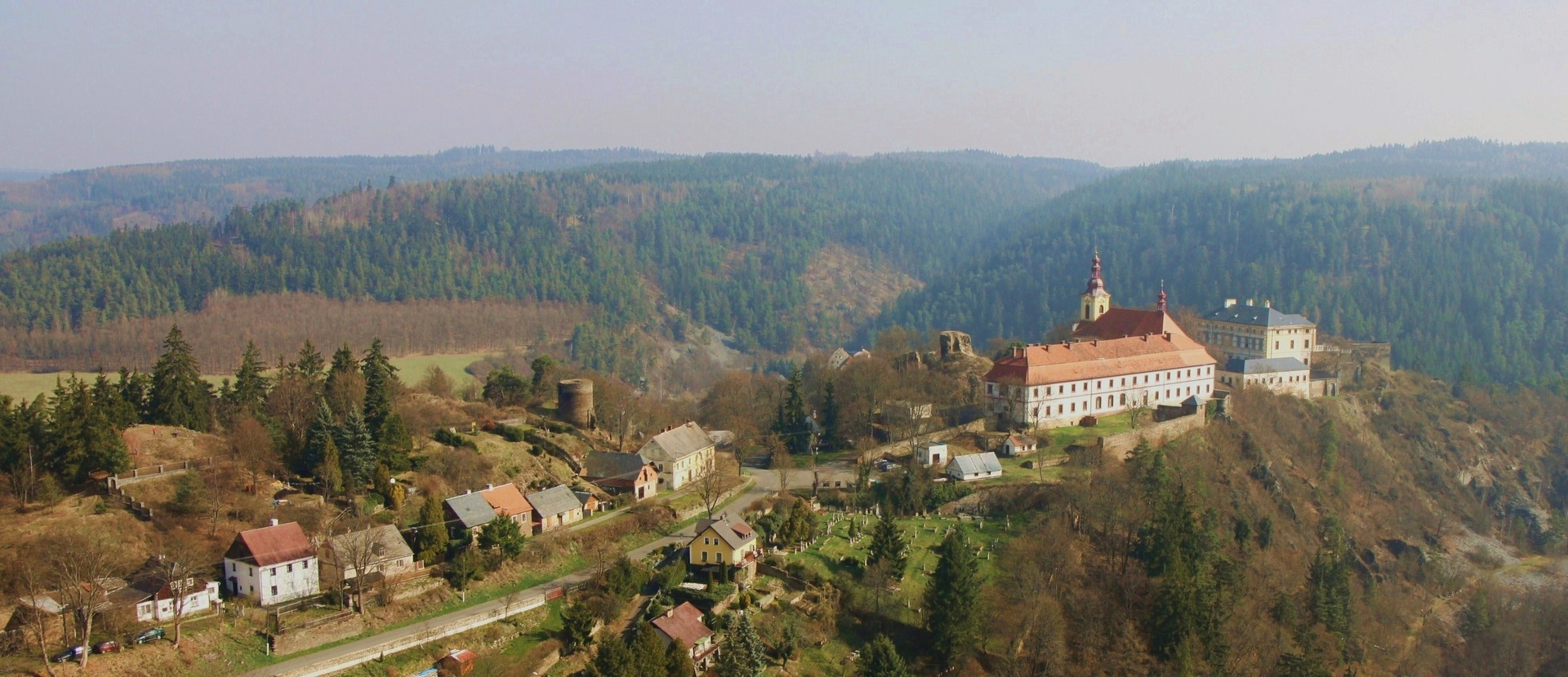 Pohled z nebe na Rabštejn nad Střelou